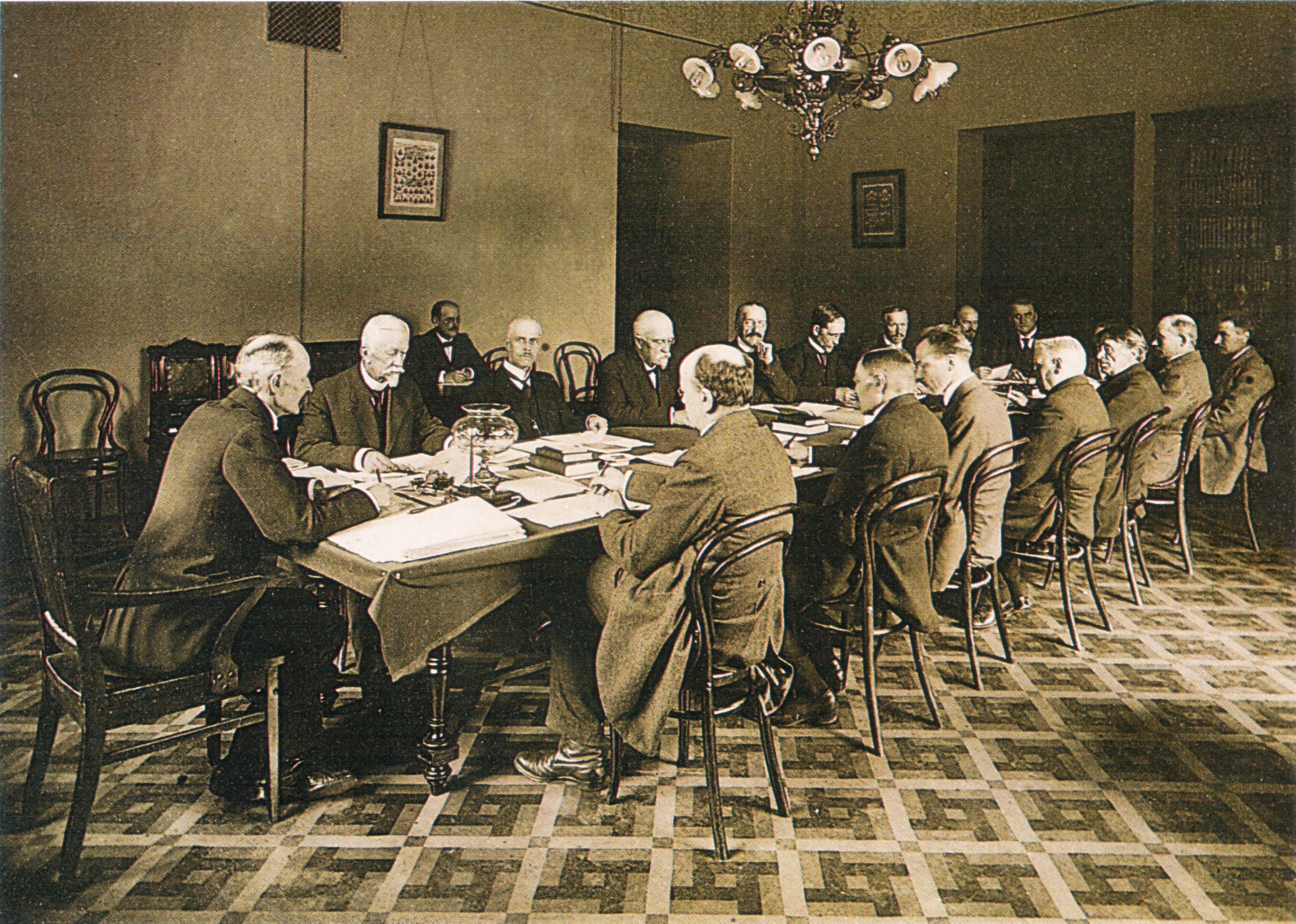 Eduskunnan perustuslakivaliokunnan kokous Säätytalossa vuonna 1918. Pöydän päässä selin puheenjohtaja K. J. Ståhlberg, hänestä vasemmalla (myötäpäivään) R. A. Wrede, Ernst Estlander, G. G. Rosenqvist, A. O. Wuorimaa, Santeri Alkio, Antti Juutilainen, J. P. Kokko, Eero Erkko, Tekla Hultin (ei näy), Pekka Pennanen, Elias Tukia, Wilhelmi Malmivaara, F. W. Bergroth, Onni Rantasalo, J. E. Antila ja Lauri Ingman. Taustalla toisessa pöydässä valiokunnan sihteeri Hjalmar Kahelin.[1]